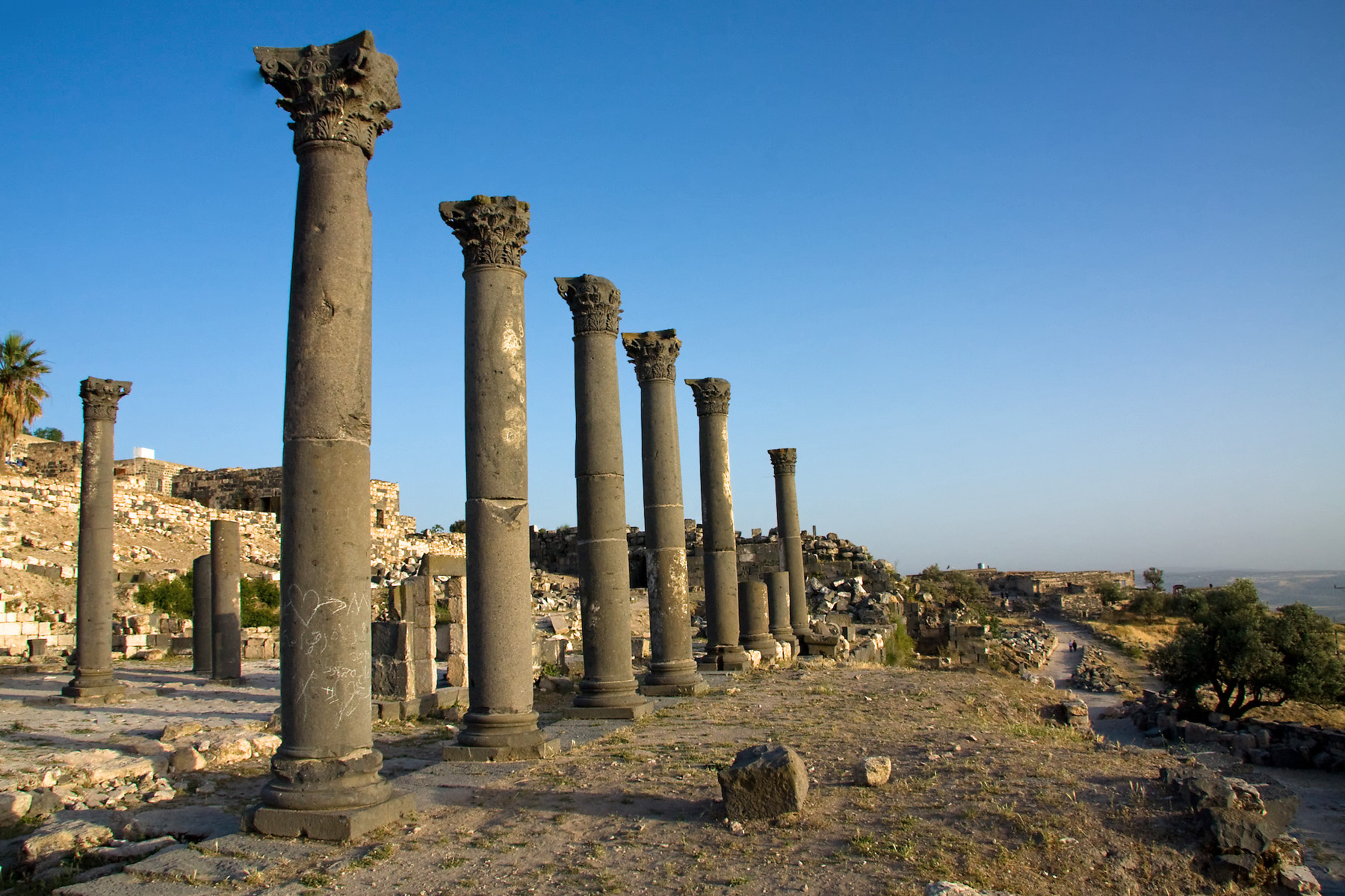 Roman ruins at Umm Qais, Jordan.